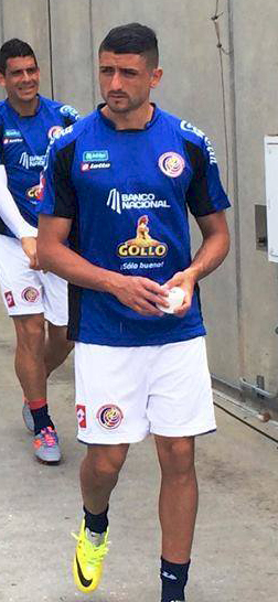 Diego Calvo en la Selección de Costa Rica en 2014.